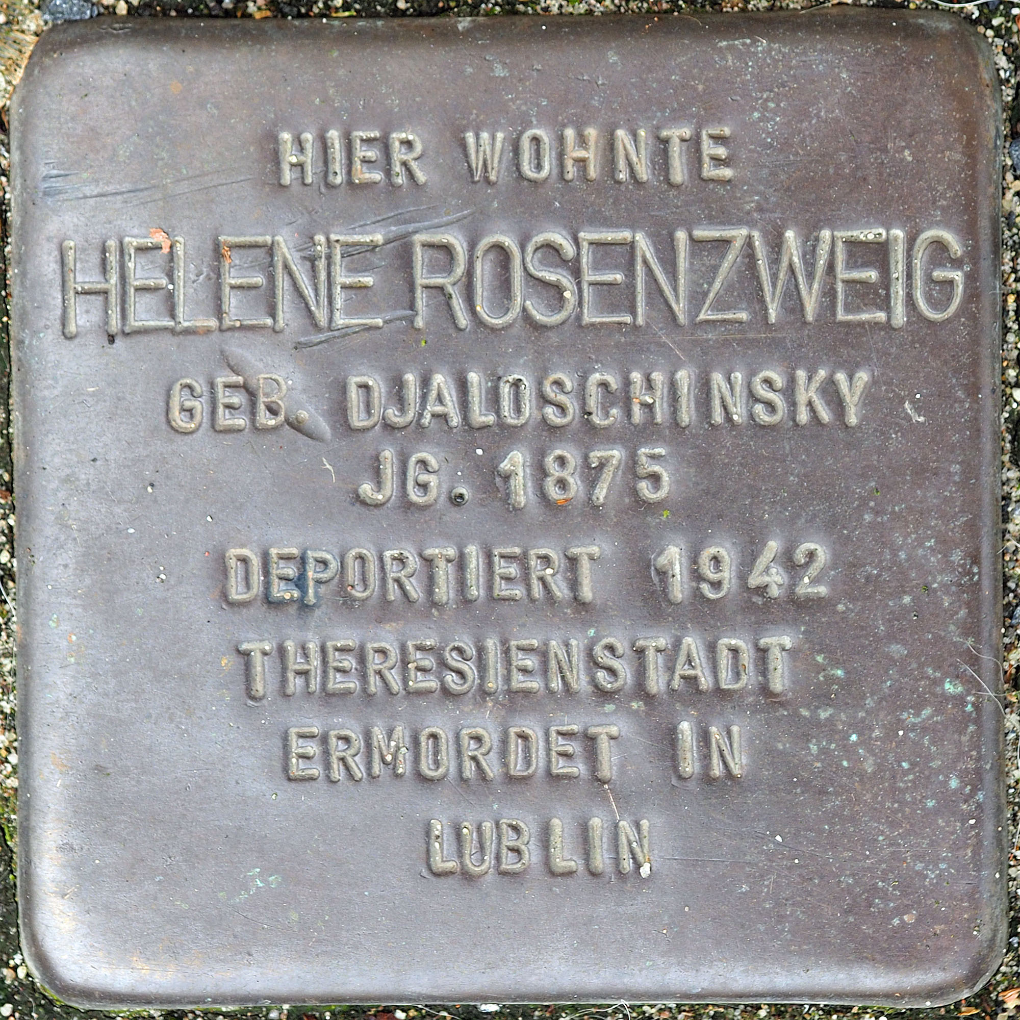 Stolpersteine MG: Rosenzweig, Helene